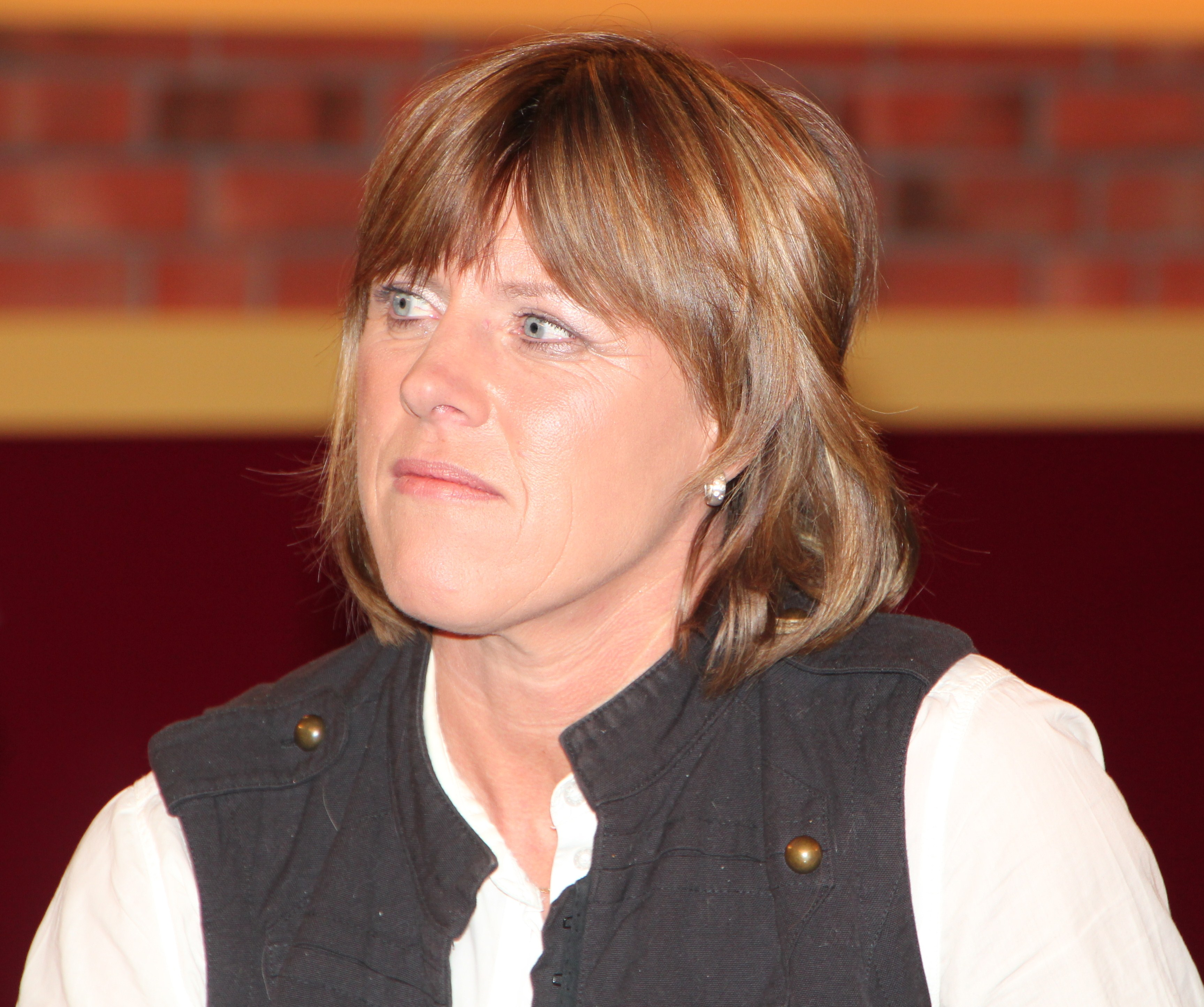 Knapp zwei Monate lebte Anja Wille in völliger Ungewissheit. Über ihre Erfahrungen und über ihr Leben nach dem Verlust ihres Sohnes hat sie ein Buch geschrieben: "Und trotzdem lebe ich weiter: Mein Leben ohne Felix."